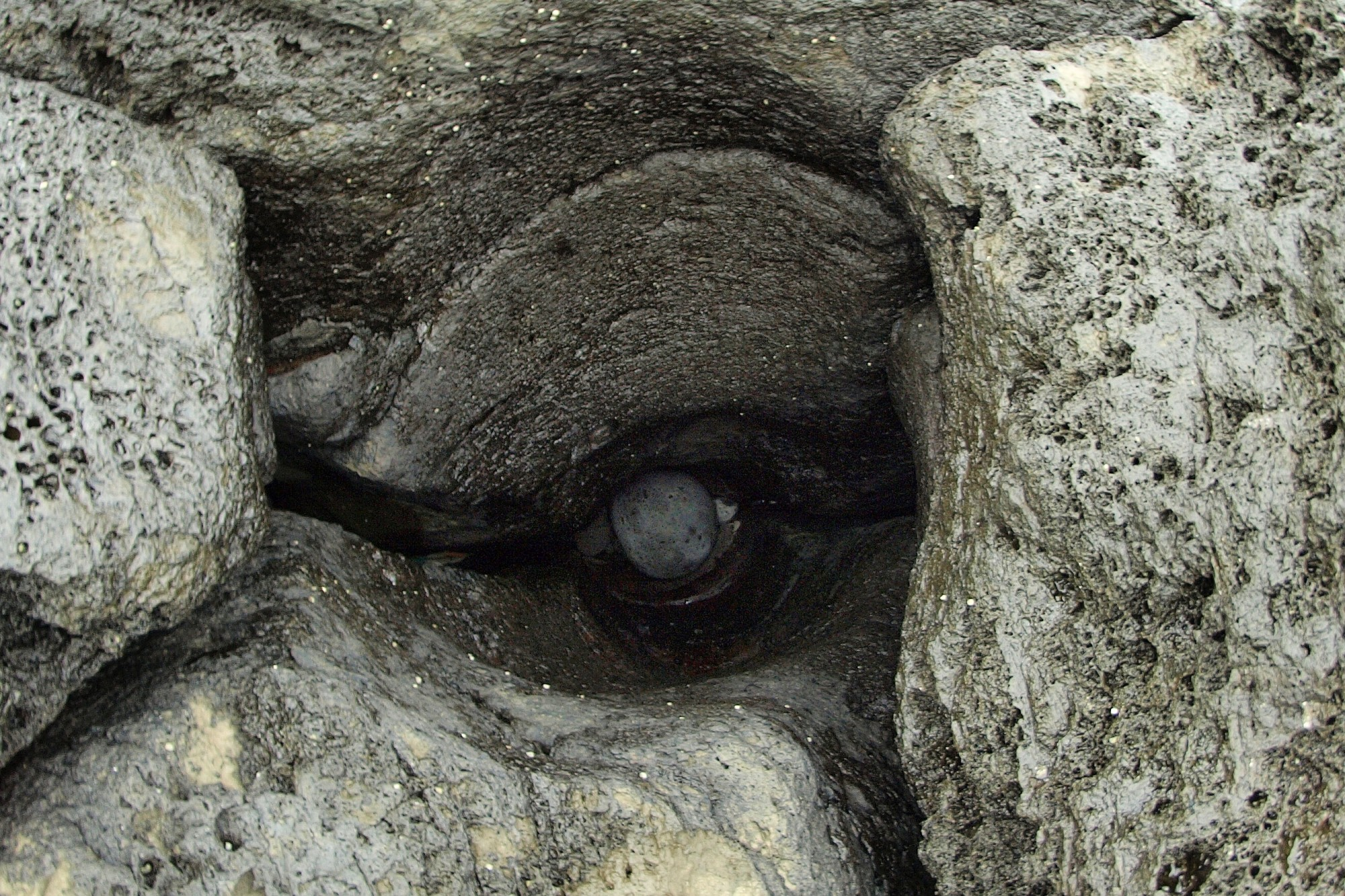 長崎県小値賀町にある斑島玉石甌穴。